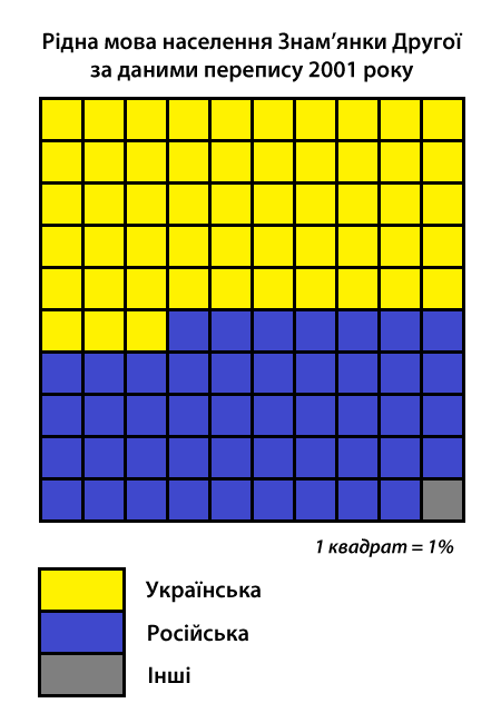 Інфографіка розподілу населення смт Знам'янка Друга Знам'янської міськради за рідною мовою згідно з даними перепису 2001 року. Джерело: Розподіл населення Кіровоградської області за рідною мовою (у % до загальної чисельності населення) за переписом 2001 року